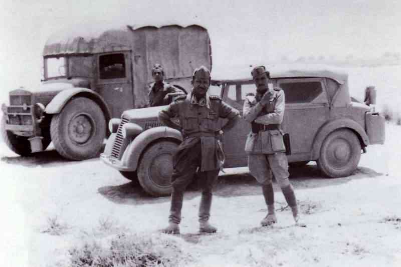 Lancia Aprilia Coloniale in nordafrica